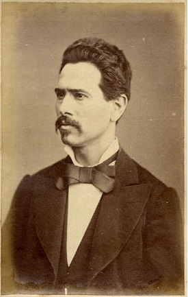 Teófilo Braga em 1882 na capa da revista Galeria Republicana N.º 13.